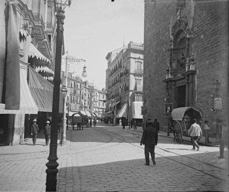 València